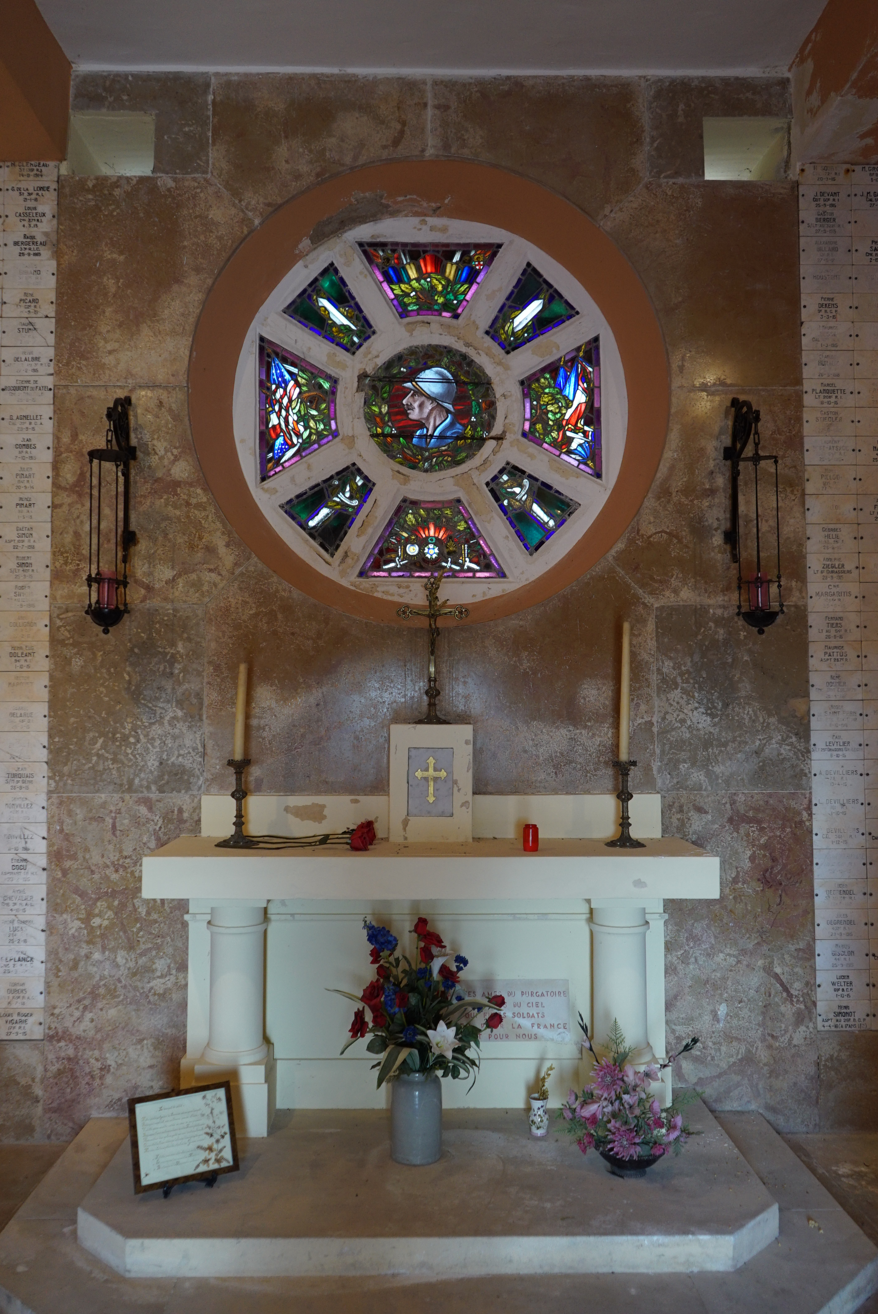 intérieur de l'ossuaire de Navarin.